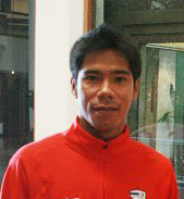 Sutee Suksomkit